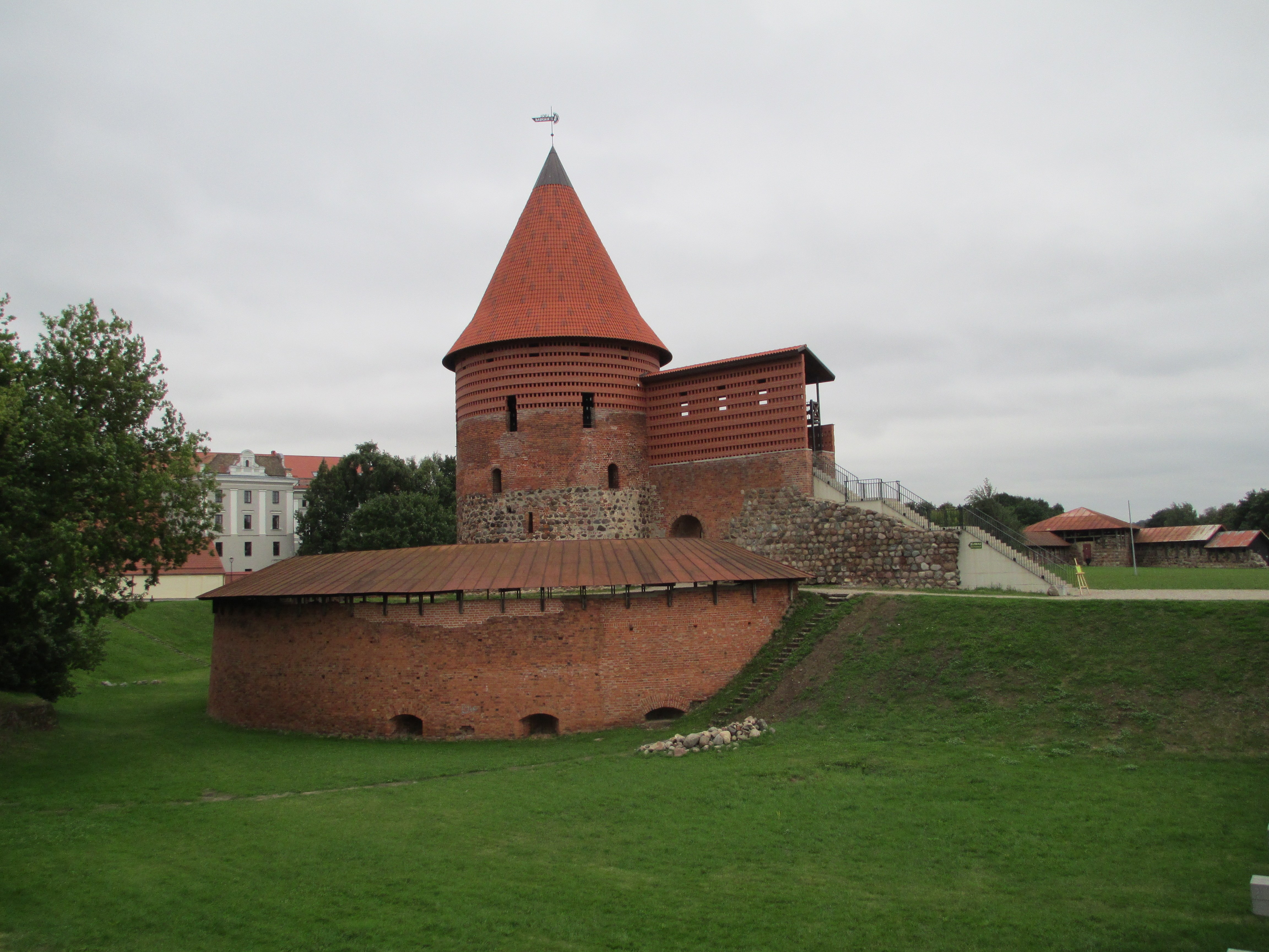 מצודת קובנה